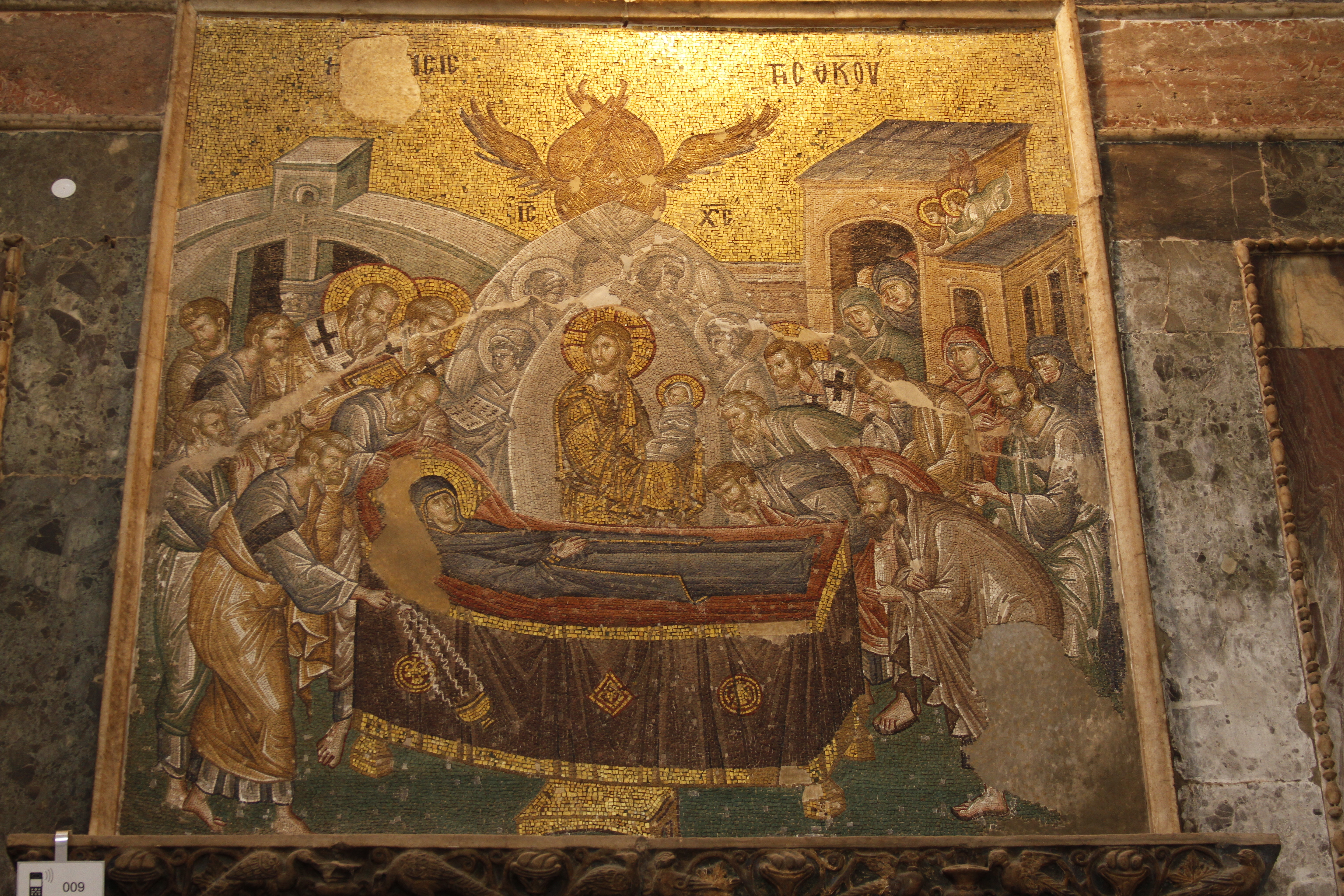 Mosaico da Dormição de Maria (koimesis) em Chora.